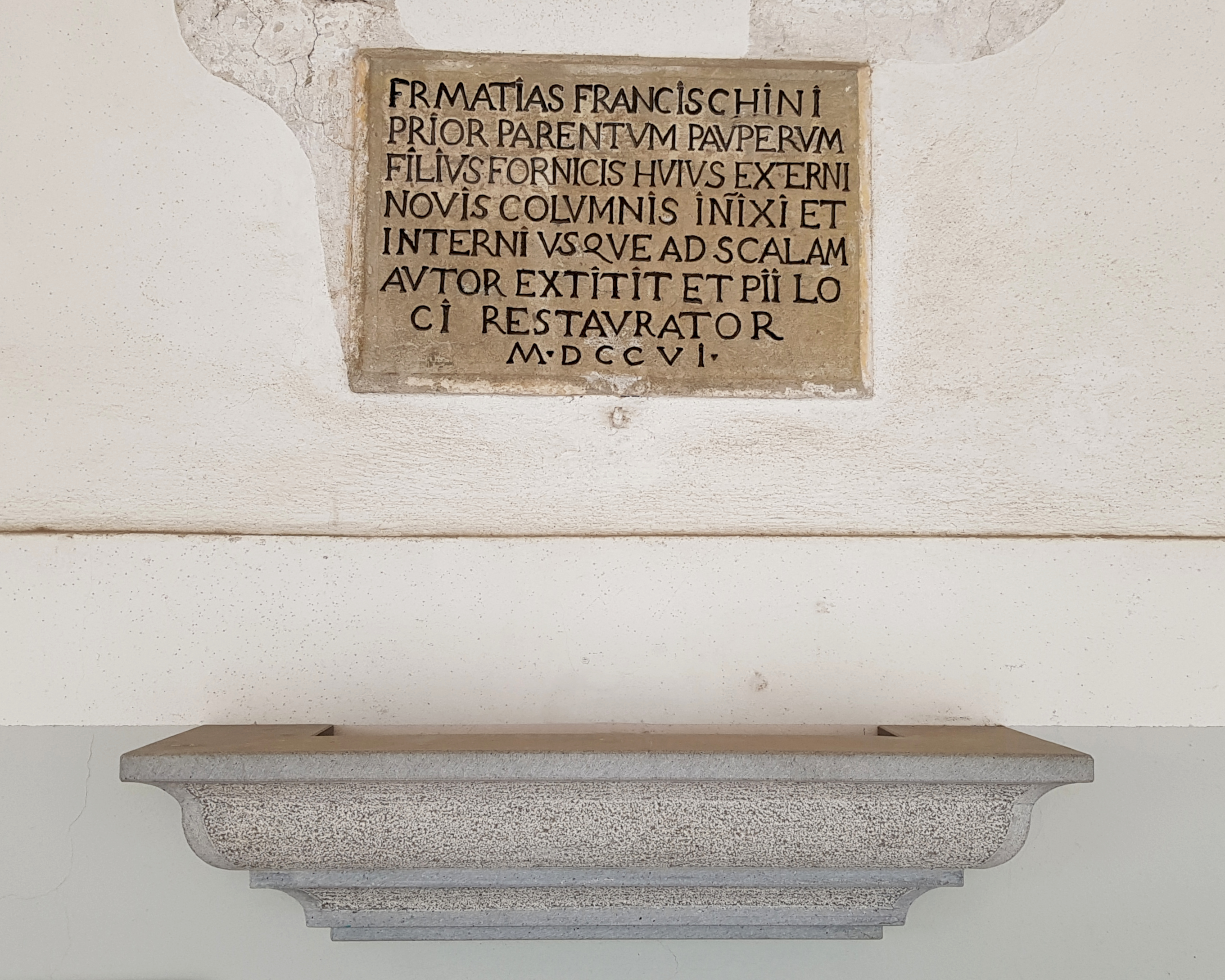 Lapide commemorativa dell'opera di restauro del Priore Franceschinis 1706, Ospedale di Santo Spitito, Ospedaletto di Gemona (UD) Italy